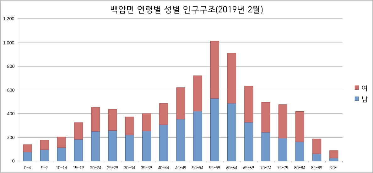 용인시 백암면 성별 인구구조